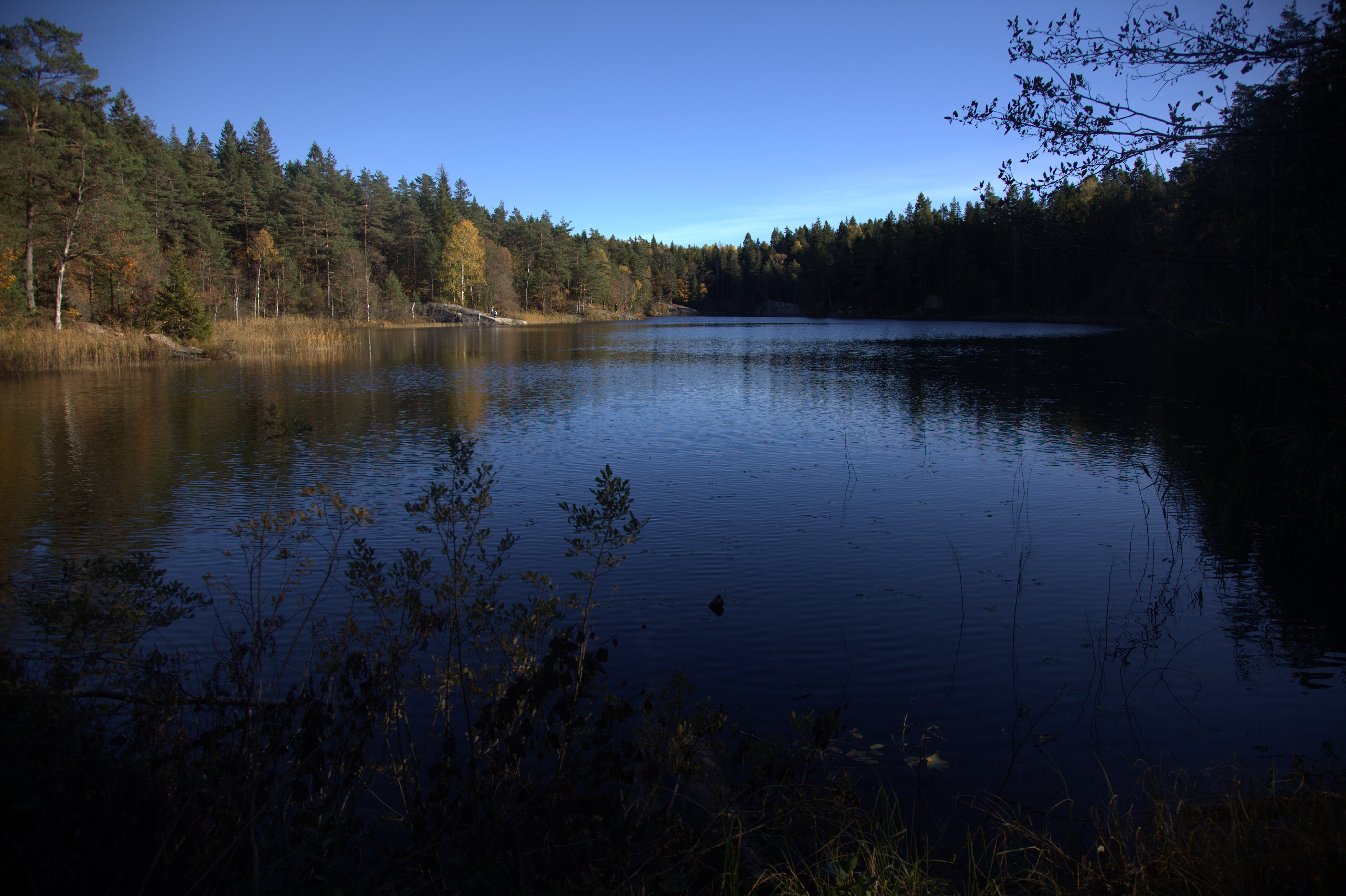 Översjön i Kungälvs kommun